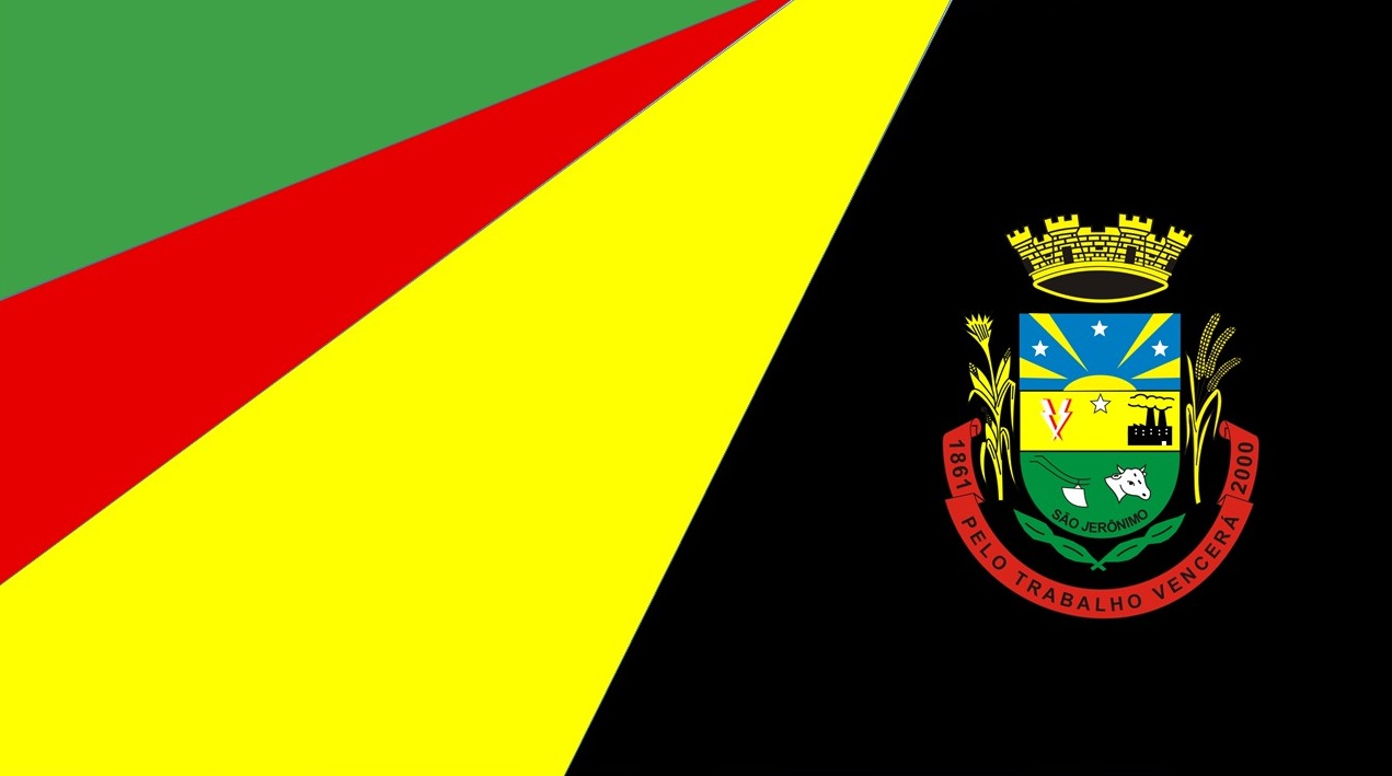 Bandeira do município de São Jerônimo, Estado do Rio Grande do Sul.